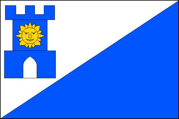 Vlajka obce Boseň